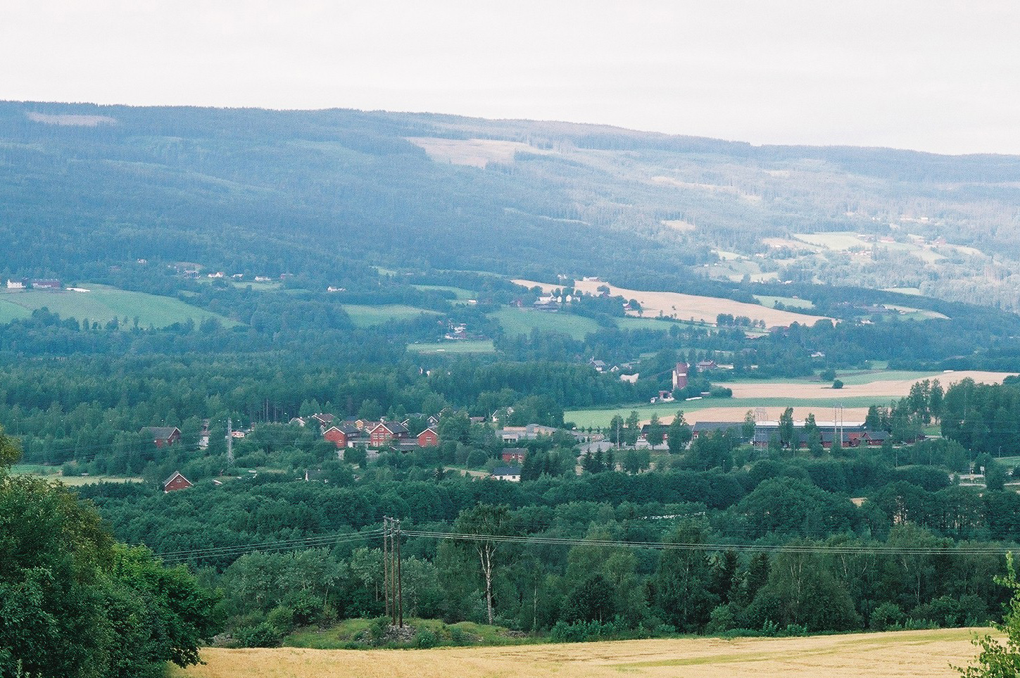 Jørstadmoen, Lillehammer, Norway.